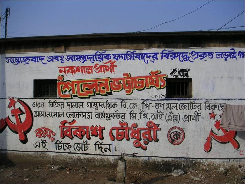 Valpropaganda i Ukhra, Asansol district, inför valet till Lok Sabha sv:2004. Nedan Communist Party of India (Marxist), för deras kandidat Bikash Chaudhury. Ovan en mural gjord av Communist Party of India (Marxist-Leninist) (Kanu Sanyal), till förmån för Provisional Central Committee, Communist Party of India (Marxist-Leninist):s kandidat. Texten lyder "I Asansols valkrets rösta på Naxalkandidaten Shalien Bhattacharya". Bhattacharya fick senare 6286 röster (0,87%). Chowdhury vann med 369 832 röster (51%). Foto: Soman